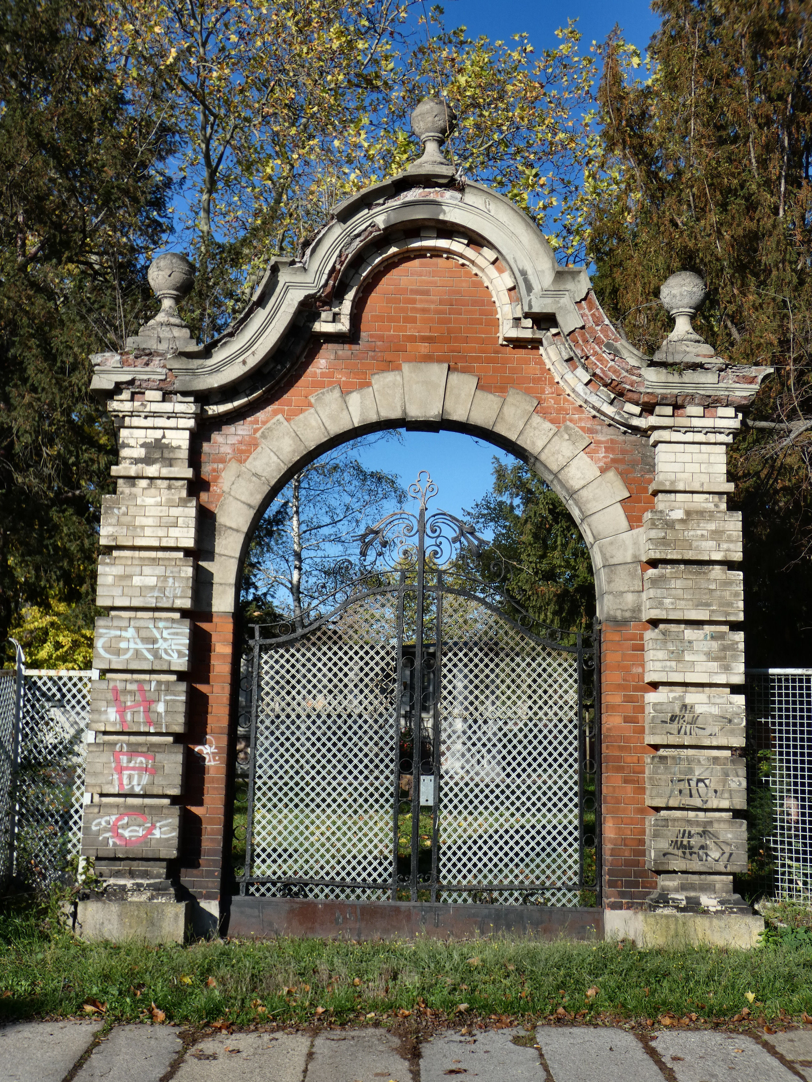 Ehemaliges Asphaltwerk und Fabrik für chemische Teerproduktion und Farben Hoppe & Roehming, Hohe Straße 1-4, Halle-Ammendorf, Portal zum Garten